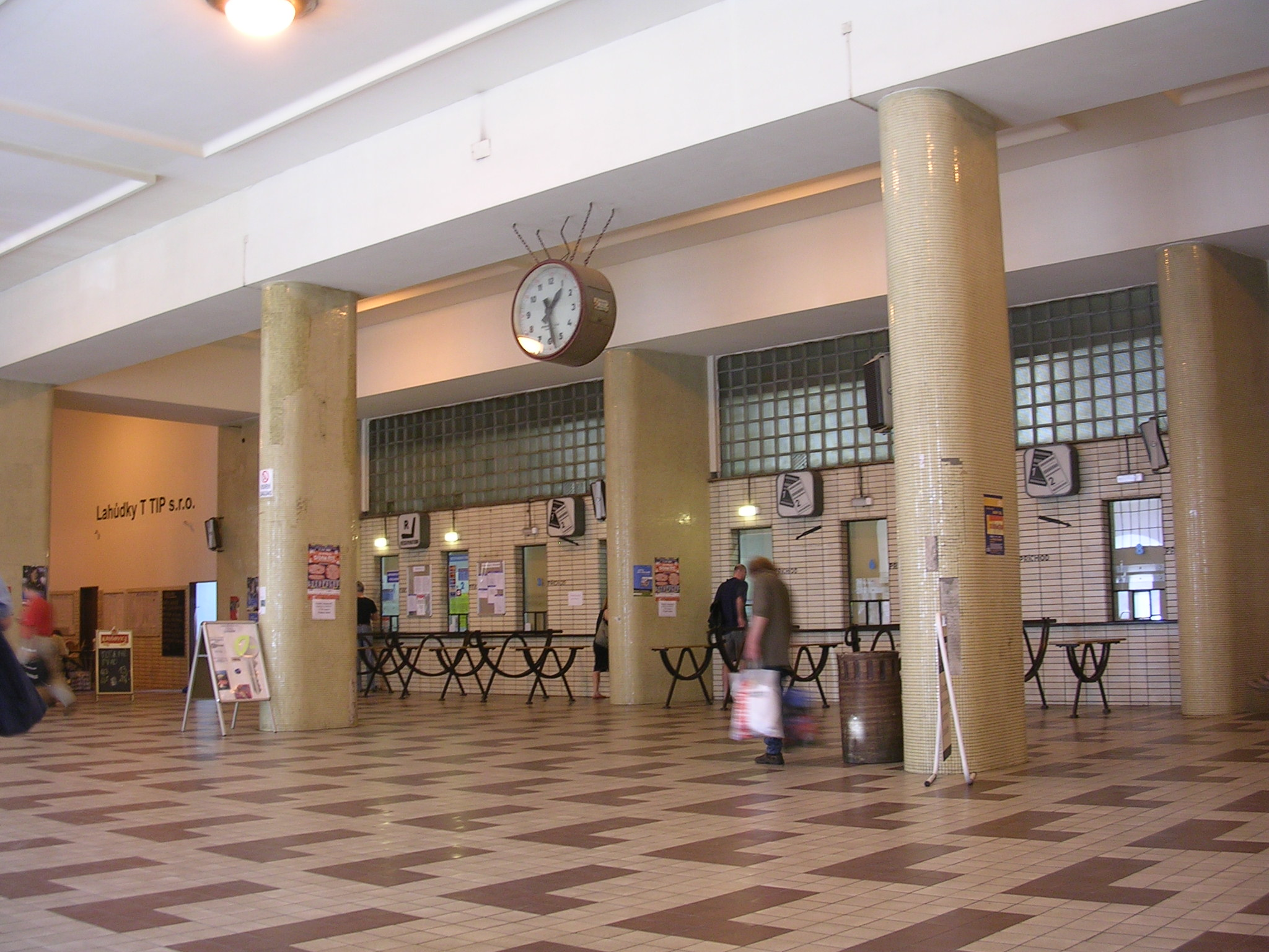 Masarykovo nádraží, osobní pokladny.